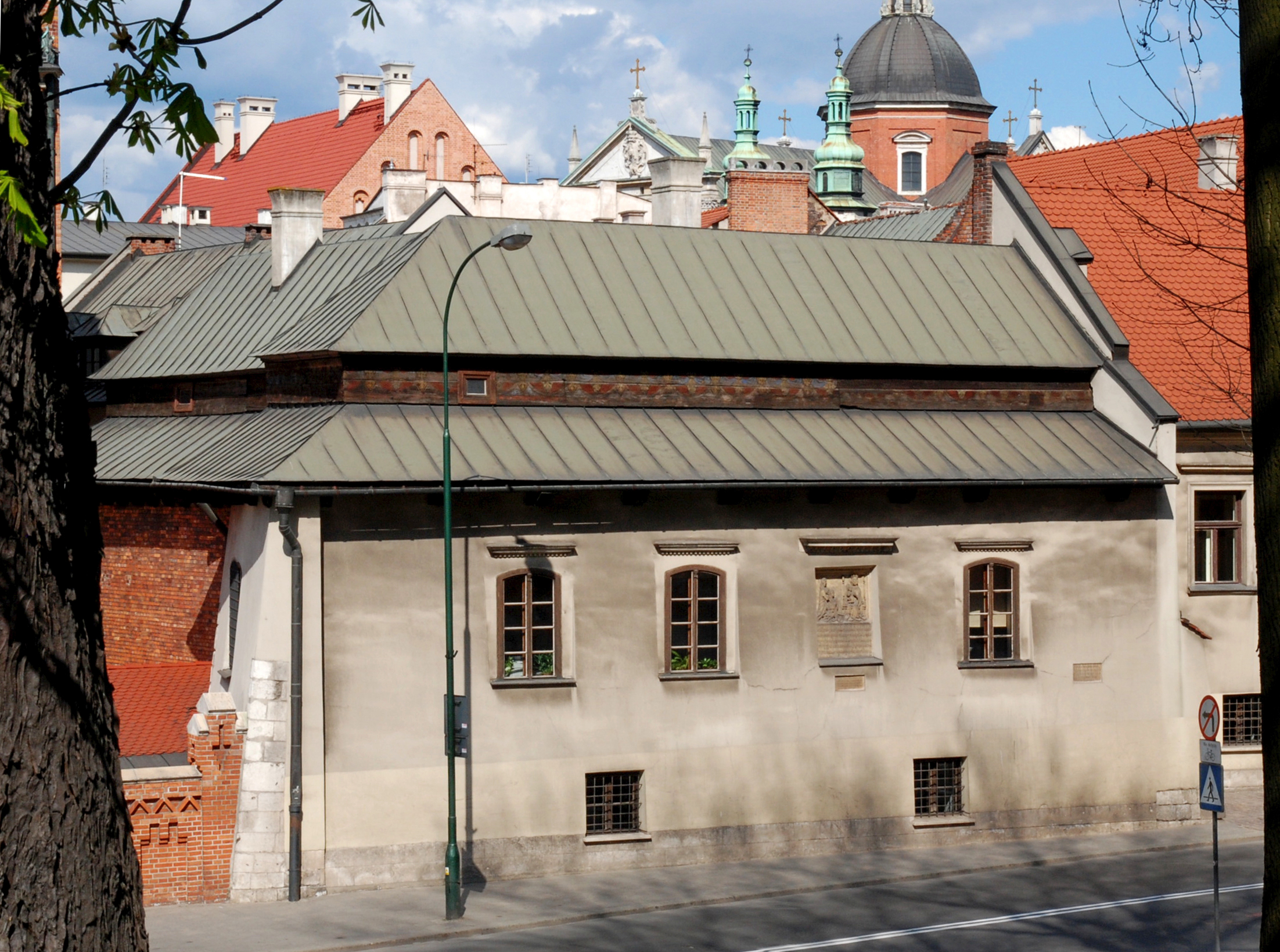 Dom Jana Długosza, od ul. Podzamcze, Kraków. Na dalszym planie kopuła kościoła św. Piotra i Pawła